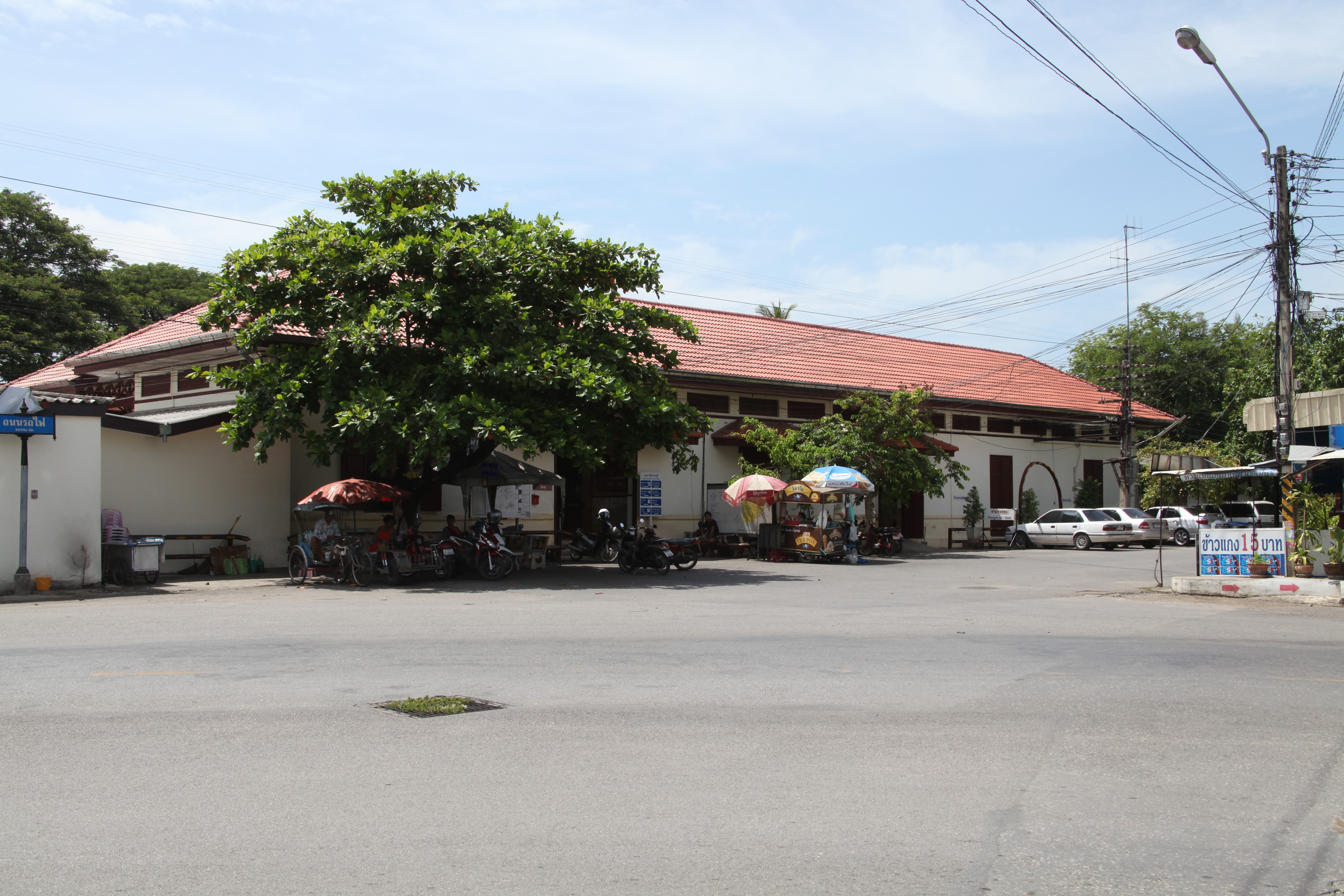 ラーチャブリー駅